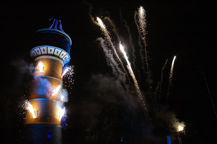 Spectacle pyrotechnique pour les 100 ans du chateau d'eau de Sélestat. Une réalisation de la société molecule (molecule-france)